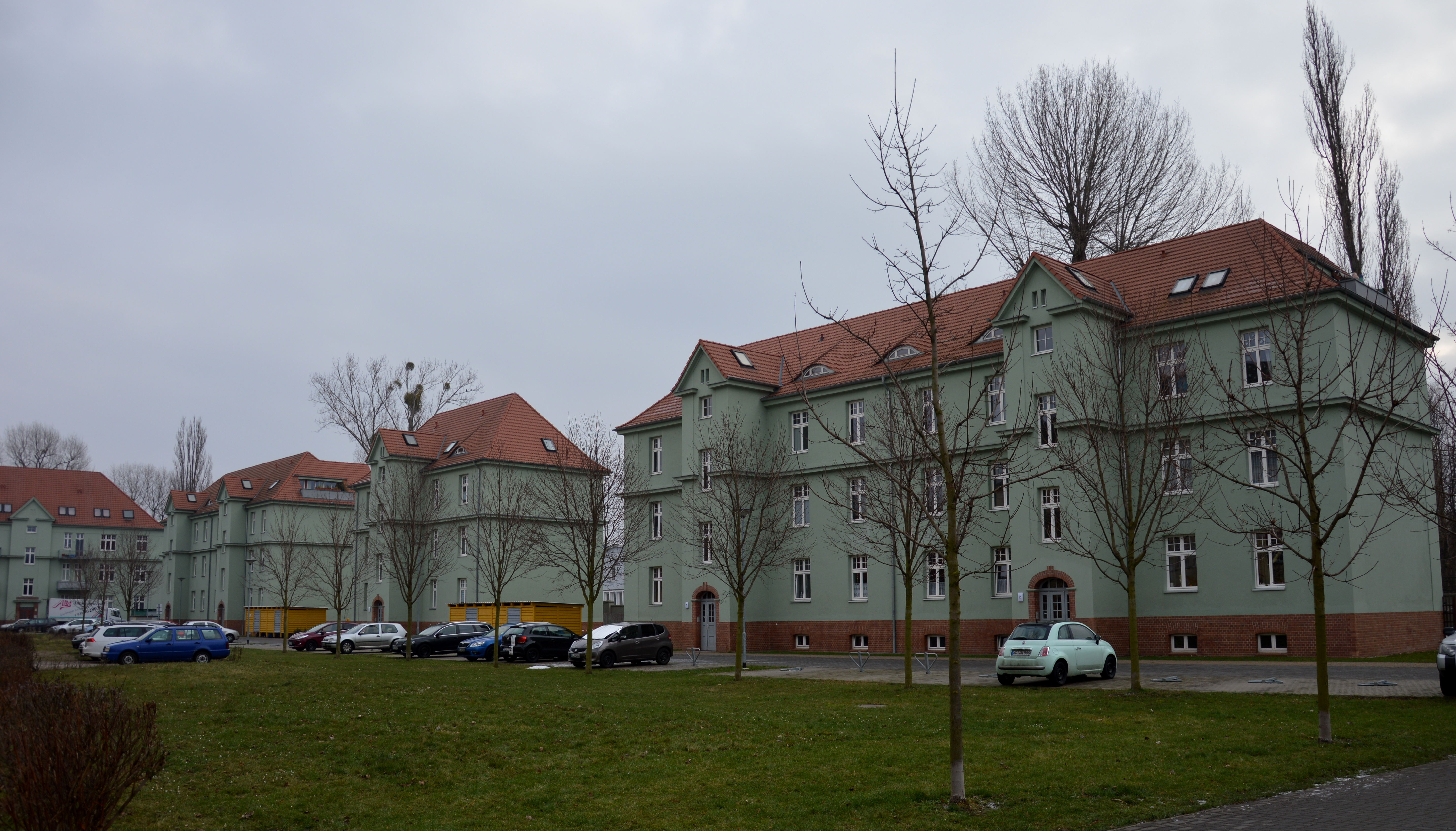 Encke-Kaserne